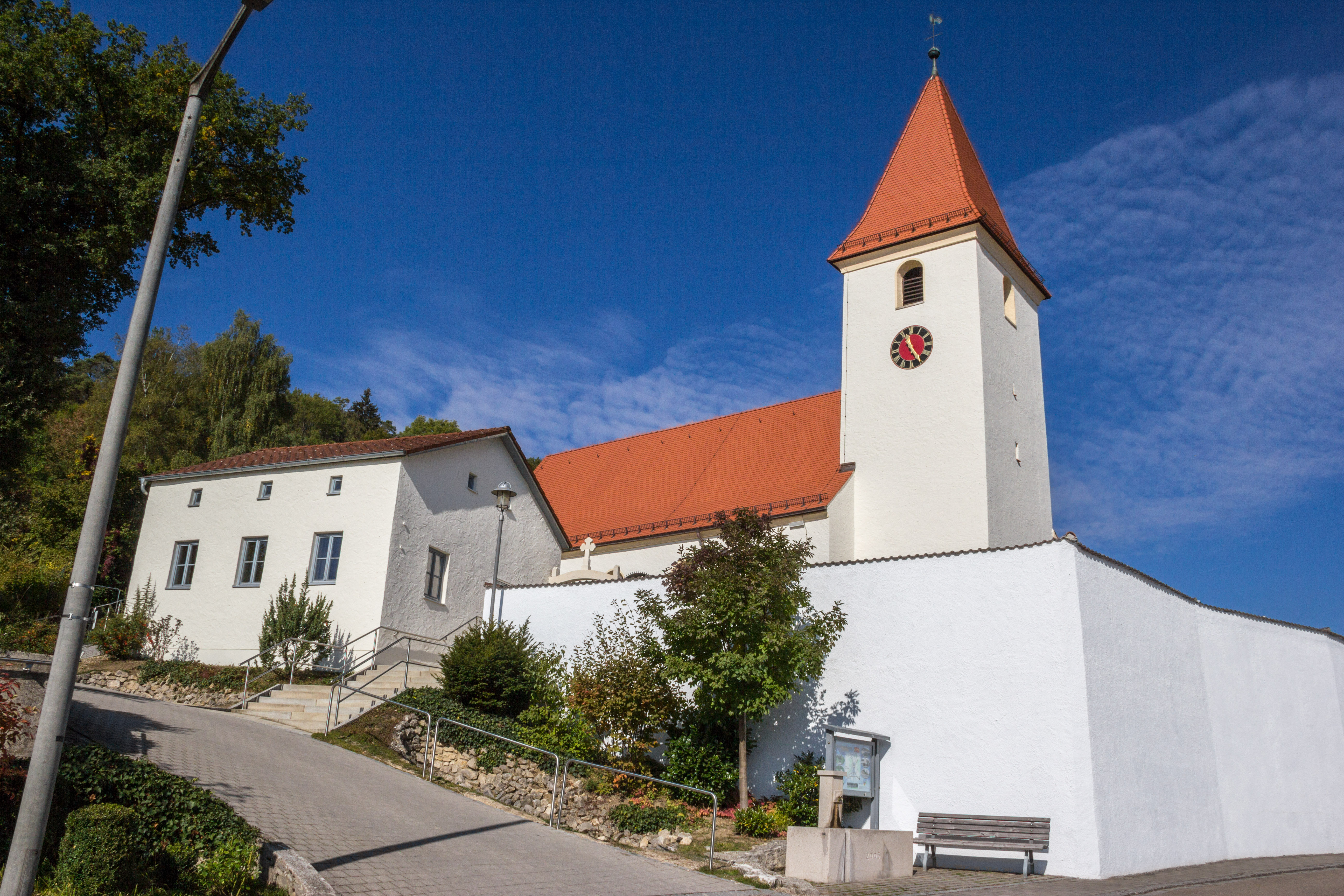 Katholische Pfarrkirche St. Martin, Saalkirche mit Steildach, Neubau von 1612 auf älterem Kern, Langhaus 1738 und 1869 erweitert, Turm romanisch, Abschluss 17. Jahrhundert; mit Ausstattung; Friedhof, ehemals befestigt, mit Resten hoher Ummauerung; ehemaliges Beinhaus, wohl 18. Jahrhundert, Umbau zur Kriegerkapelle, 1920; Taufstein und Piscina, beide mittelalterlich, neben dem Pfarramt (sogenannter Martinssaal) aufgestellt; zwei barocke und ein klassizistischer Priestergrabstein in der südlichen Friedhofsmauer eingelassen.